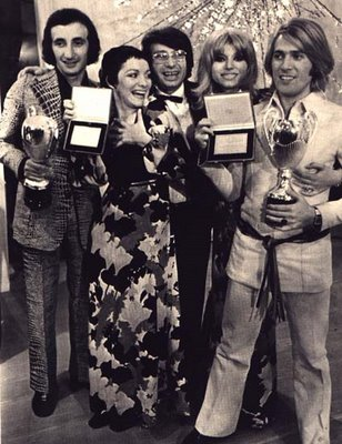 Nicola Di Bari e i Ricchi e Poveri, secondi classificati al Festival di Sanremo 1970